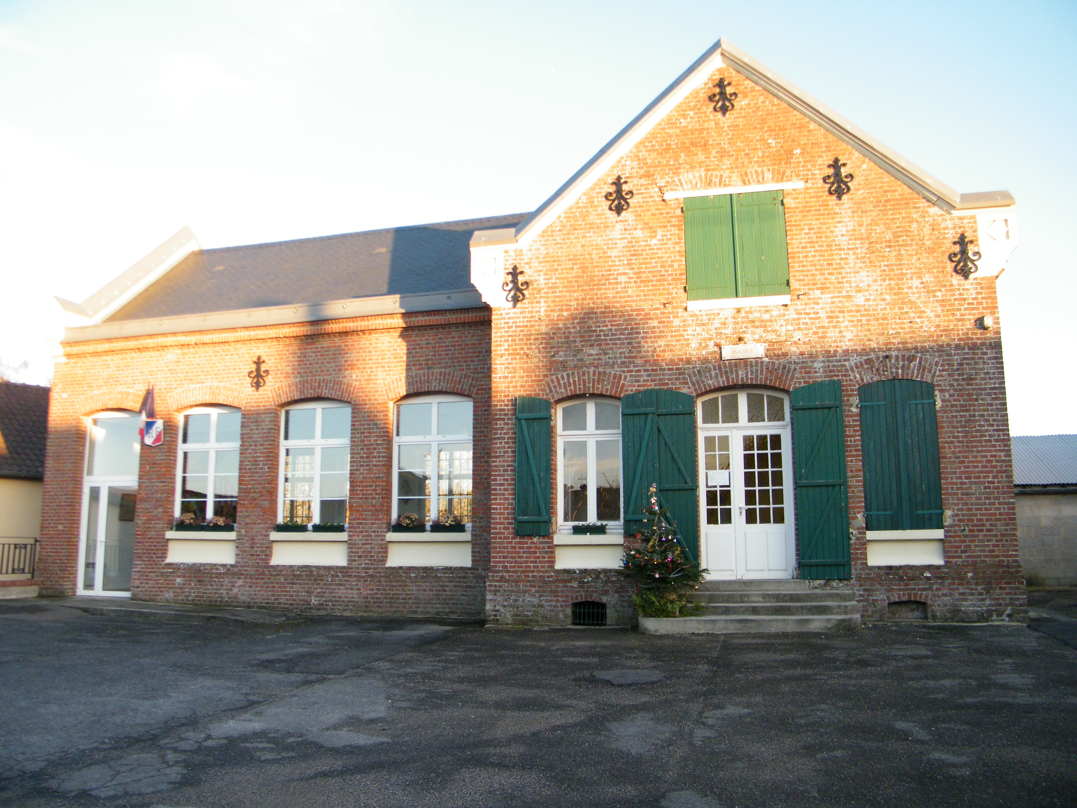 Mairie, ancienne école.